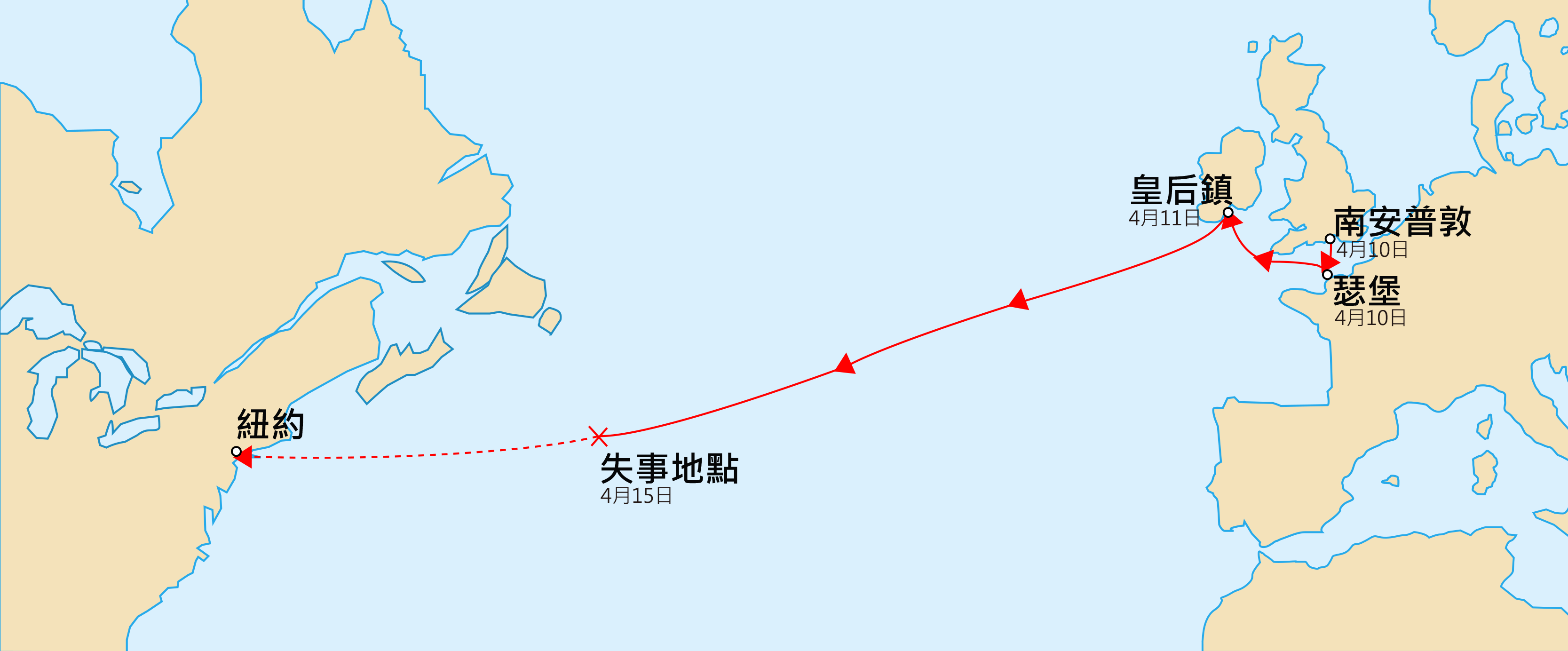 圖片顯示英國皇家郵輪鐵達尼號的停靠站、航線與4月15日失事地點。未完成的剩餘航線標示為虛線。